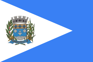 Bandeira de Reginópolis - SP - Brasil.